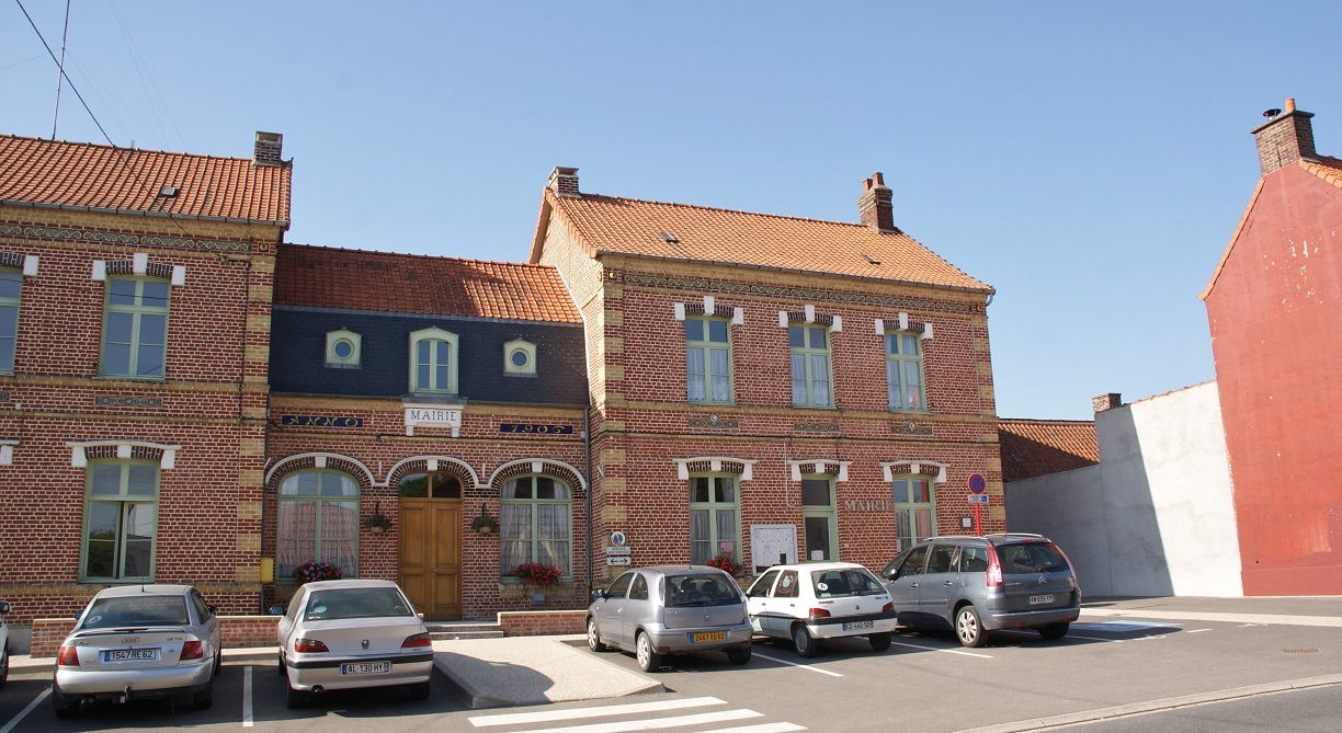 La Mairie